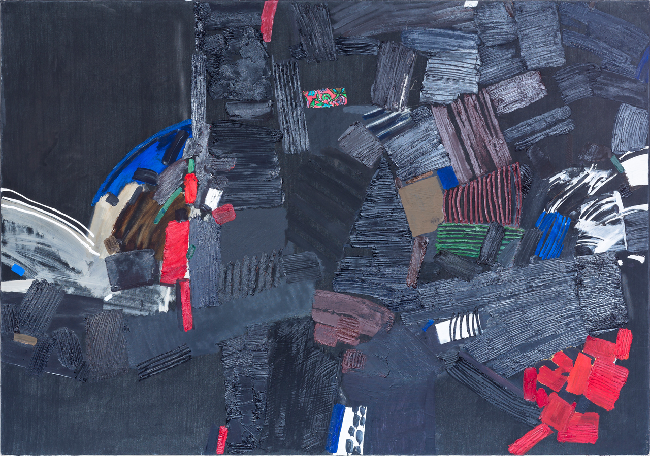 Sonia Jakuschewa, Ruská krajina, 1992, akryl, olej a koláž na plátně, 140 x 200 cm, foto Dirk Eisermann